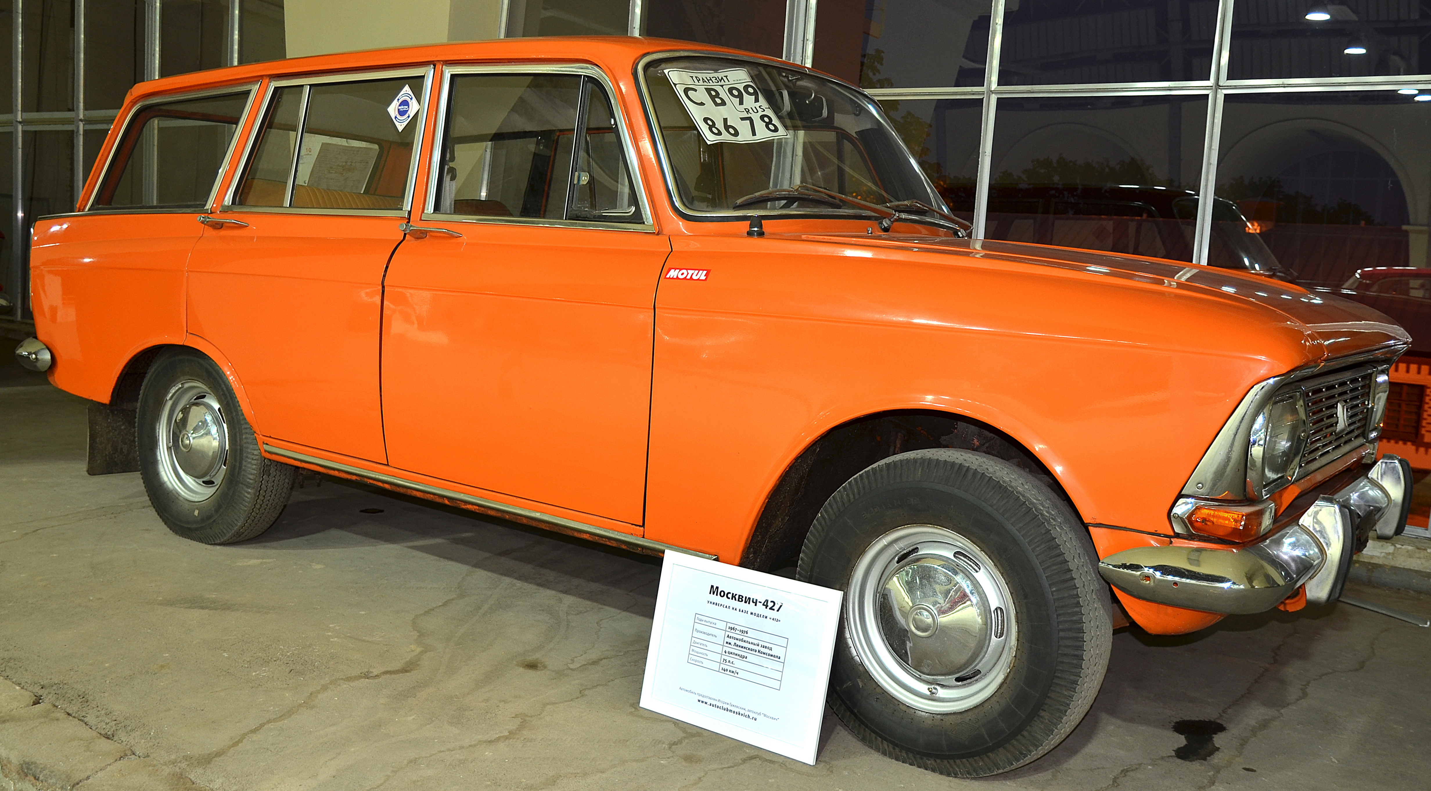 Можно увидеть здесь : You can see here